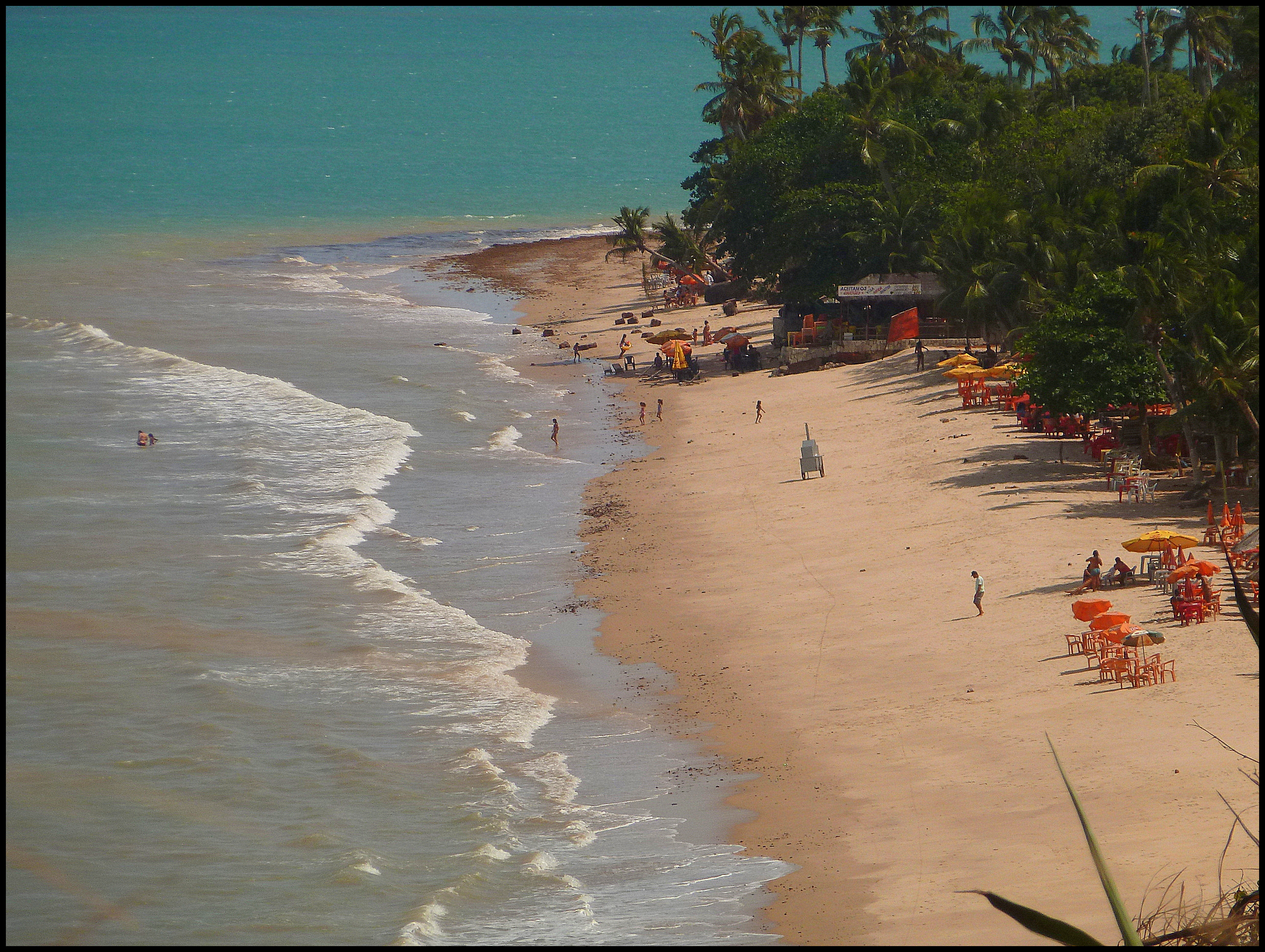 Praia de Cabo Branco